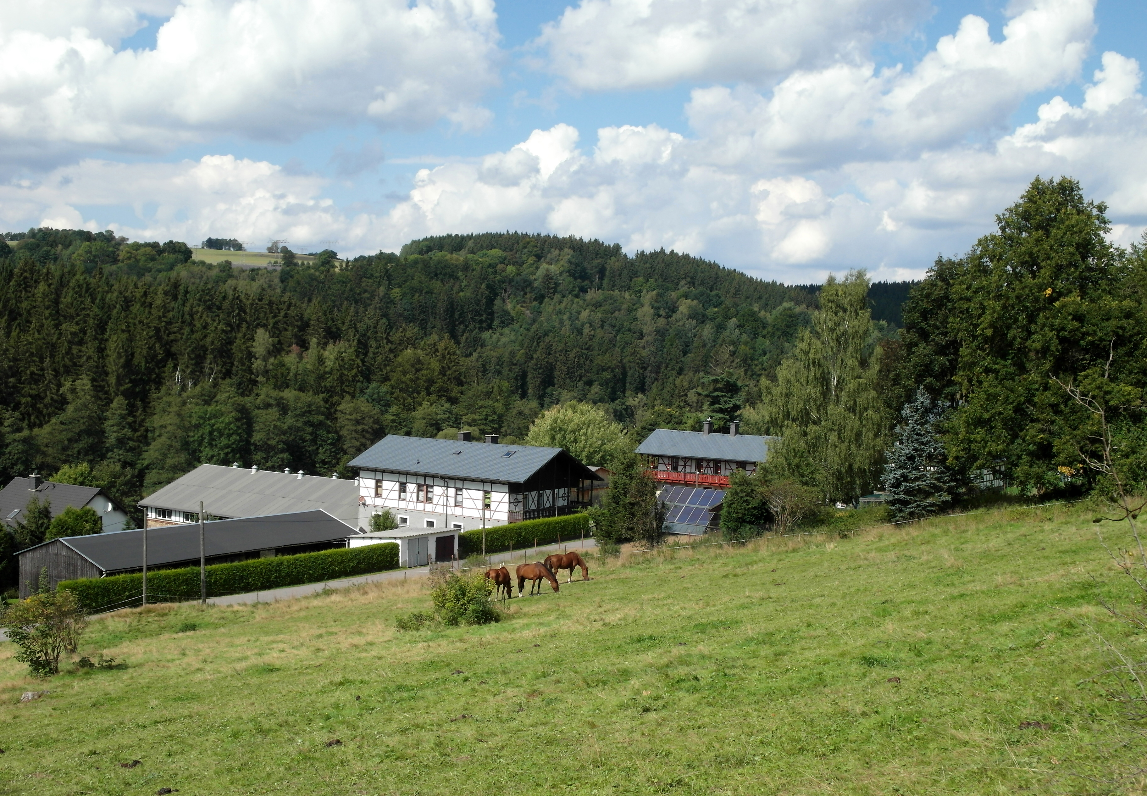 (04.09.2017, 09518) Streckewalde (zu Großrückerswalde), Sachsen, Eisenbergstraße; (GMP: 50.619982,13.058444): Das Gestüt Streckewalde (heute Reitverein) war einst Teil des Ritterguts. Kommerzienrat Arthur Schmidt, seit 1898 Eigentümer des Ritterguts, ersetzte 1908 bis 1910 das etwas höher am Hang (rechts außerhalb des Bildes) liegende alte Herrenhaus durch eine schloßartige Villa, das "Schloß Hohenwendel", nach Entwurf des Berliner Architekten Otto Schulze-Kolbitz (GMP: 50.620853,13.061761). Das Schloss ist im Herbst 2017 voll eingerüstet und wird saniert. (SAM1706.JPG]20170904400DR.JPG (c) Blobelt)